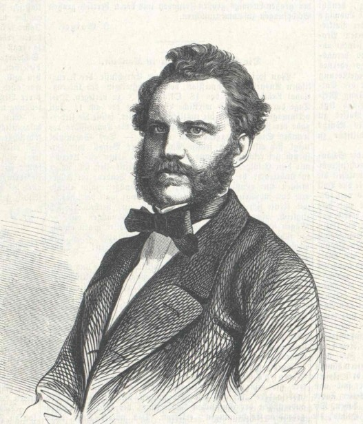 Tobias Wildauer von Wildhausen (1825 - 1898), Rakouský vysokoškolský pedagog a politik.